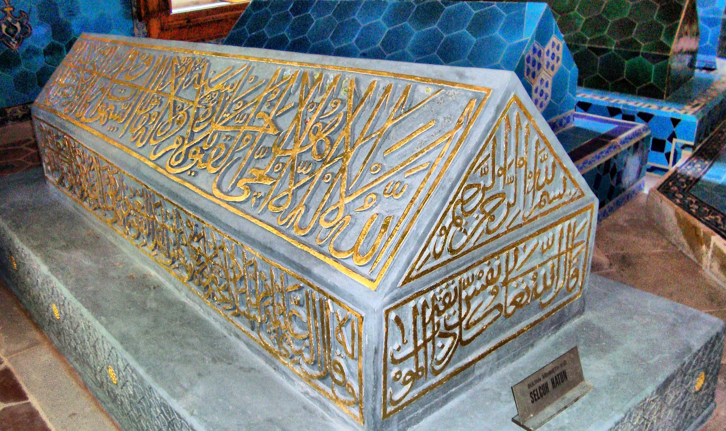 Yeşil türbe ( Selçuk Hatun )-Bursa